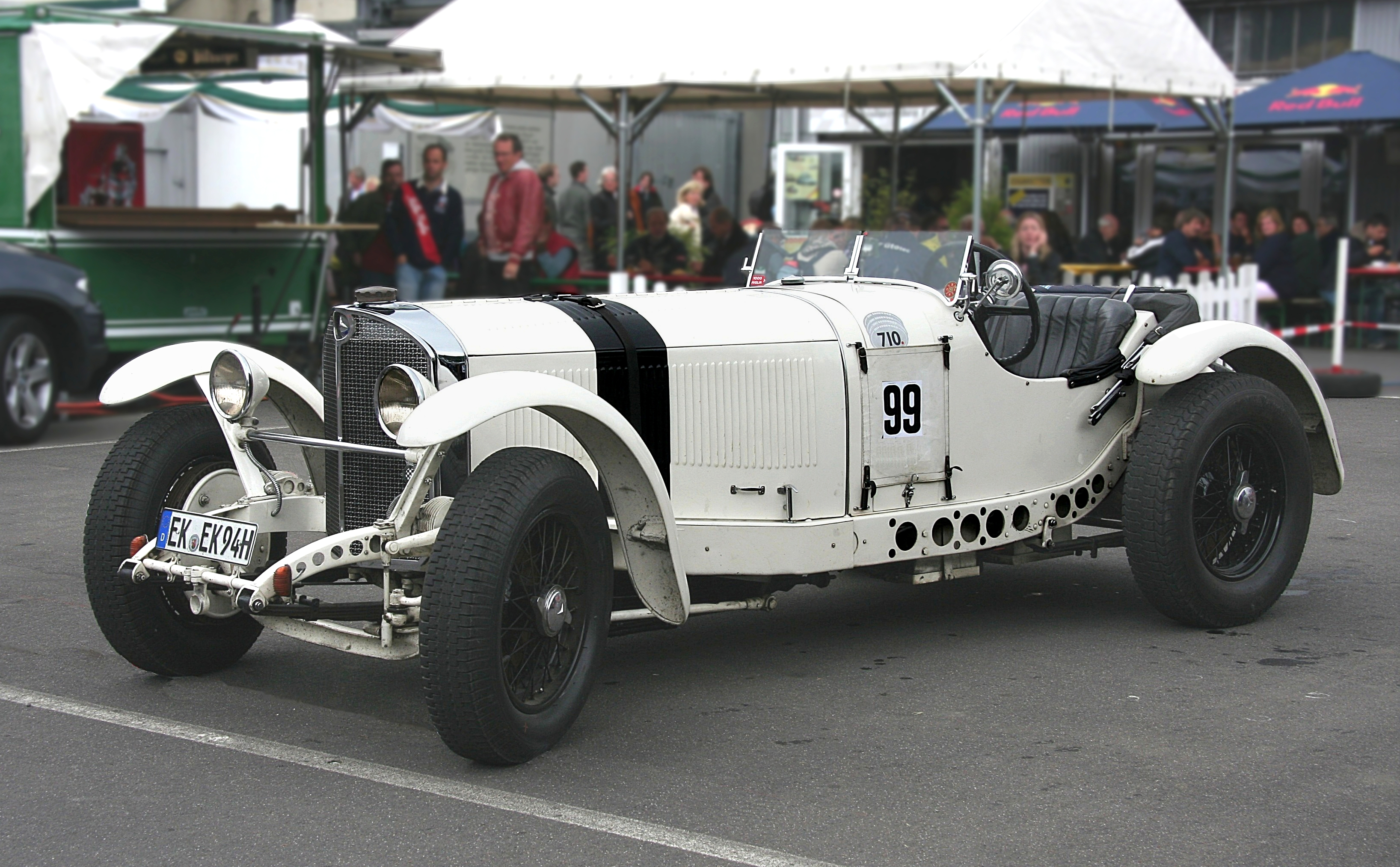 Mercedes-Benz SSKL, Baujahr 1931 beim Oldtimer-Festival des DAMC im alten Fahrerlager des Nürburgrings; 6-Zylinder-Motor, 7,1 l Hubraum, ca. 300 PS, Höchstgeschwindigkeit etwa 230 km/h. Das L in der Typbezeichnung steht für Leichtbau.